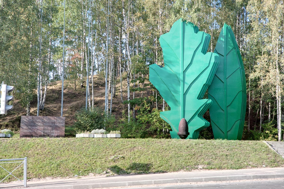 памятник Дуб и лавр (Румболовская высота); 12.09.2009